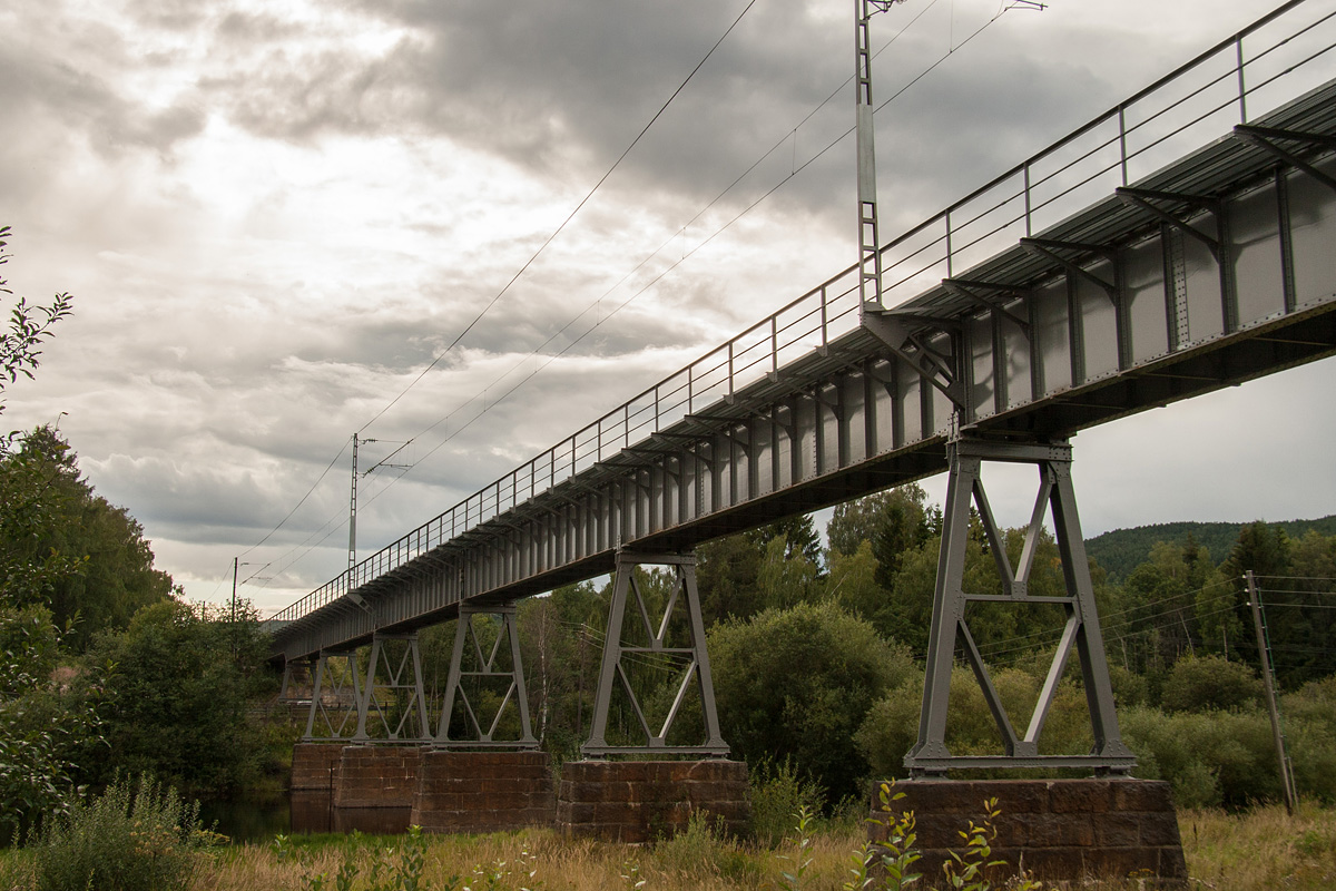 Bjerke bru på Randsfjordbanen sett nedenfra.